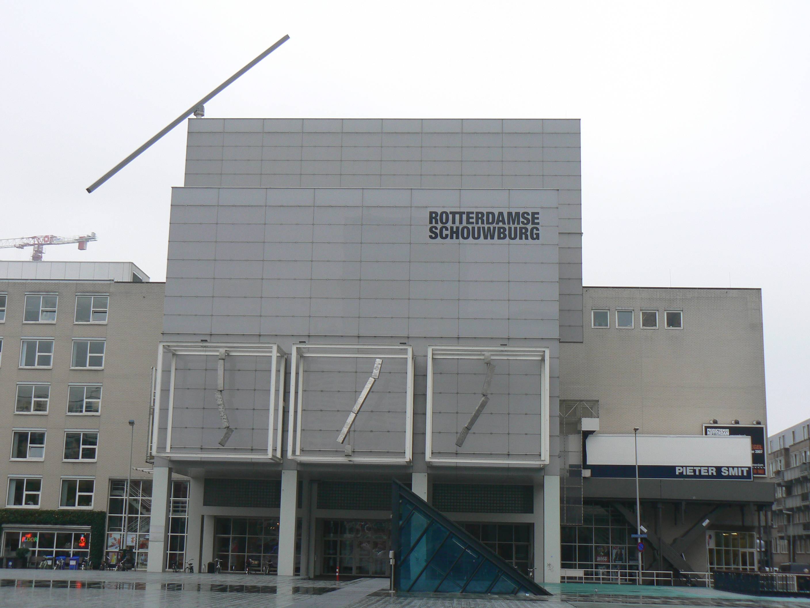 Theatre Rotterdam, The NetherlandsBalancerende energie lijn (Balancing energy line) Jan van Munster 1988